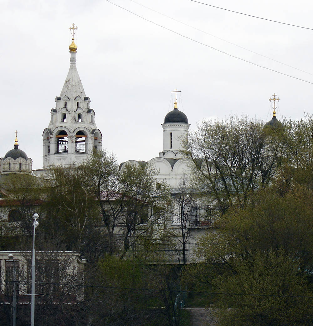 St.Nikita Church, Moscow (Athos Metochion). View from across Moskva River.Храм Никиты Мученика в подворье Афонского монастыря в Москве ("на Швивой Горке"). Гончарная улица, 6. Вид с противоположного берега реки Москвы.